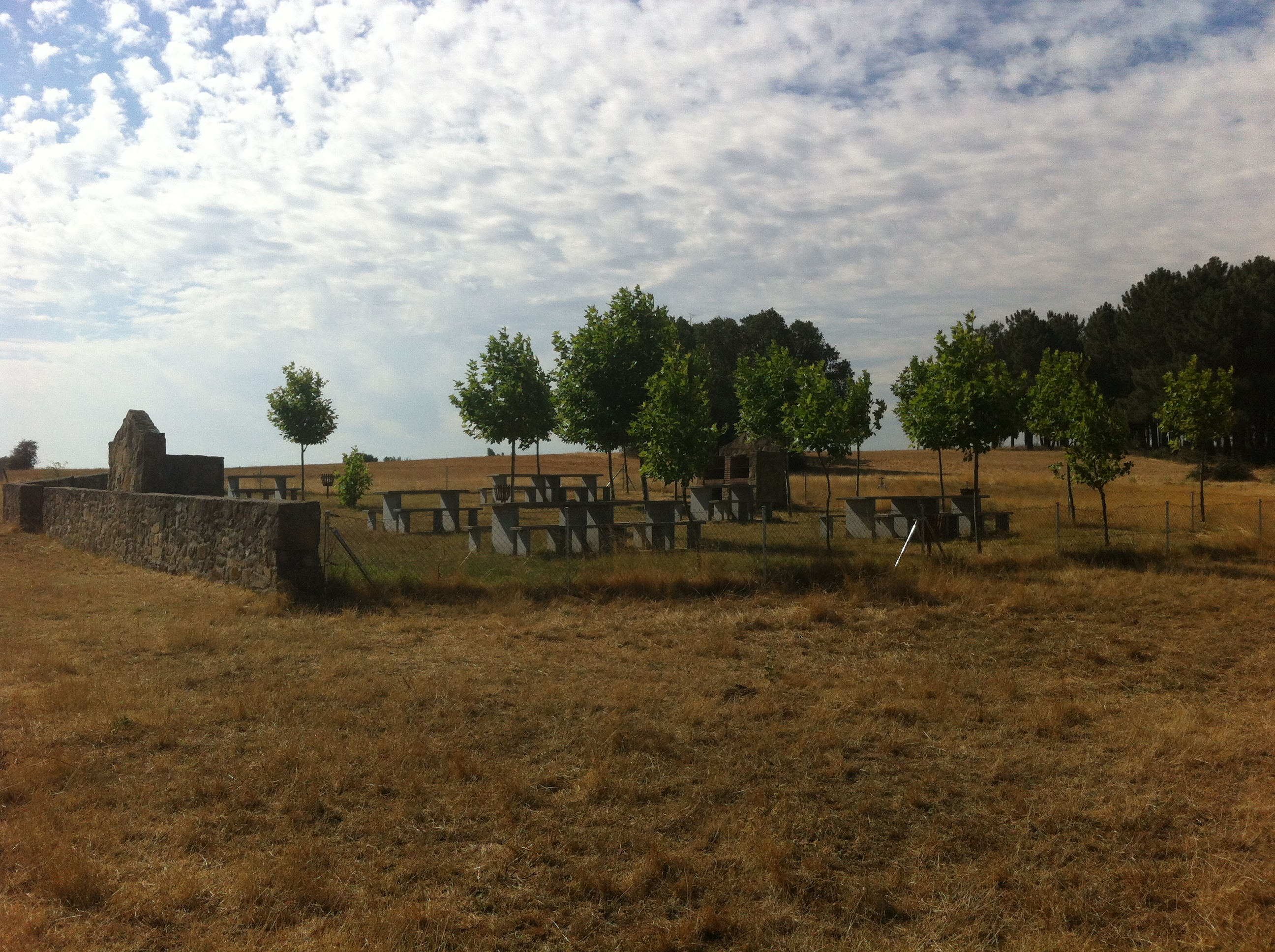 Merendero de El Caño